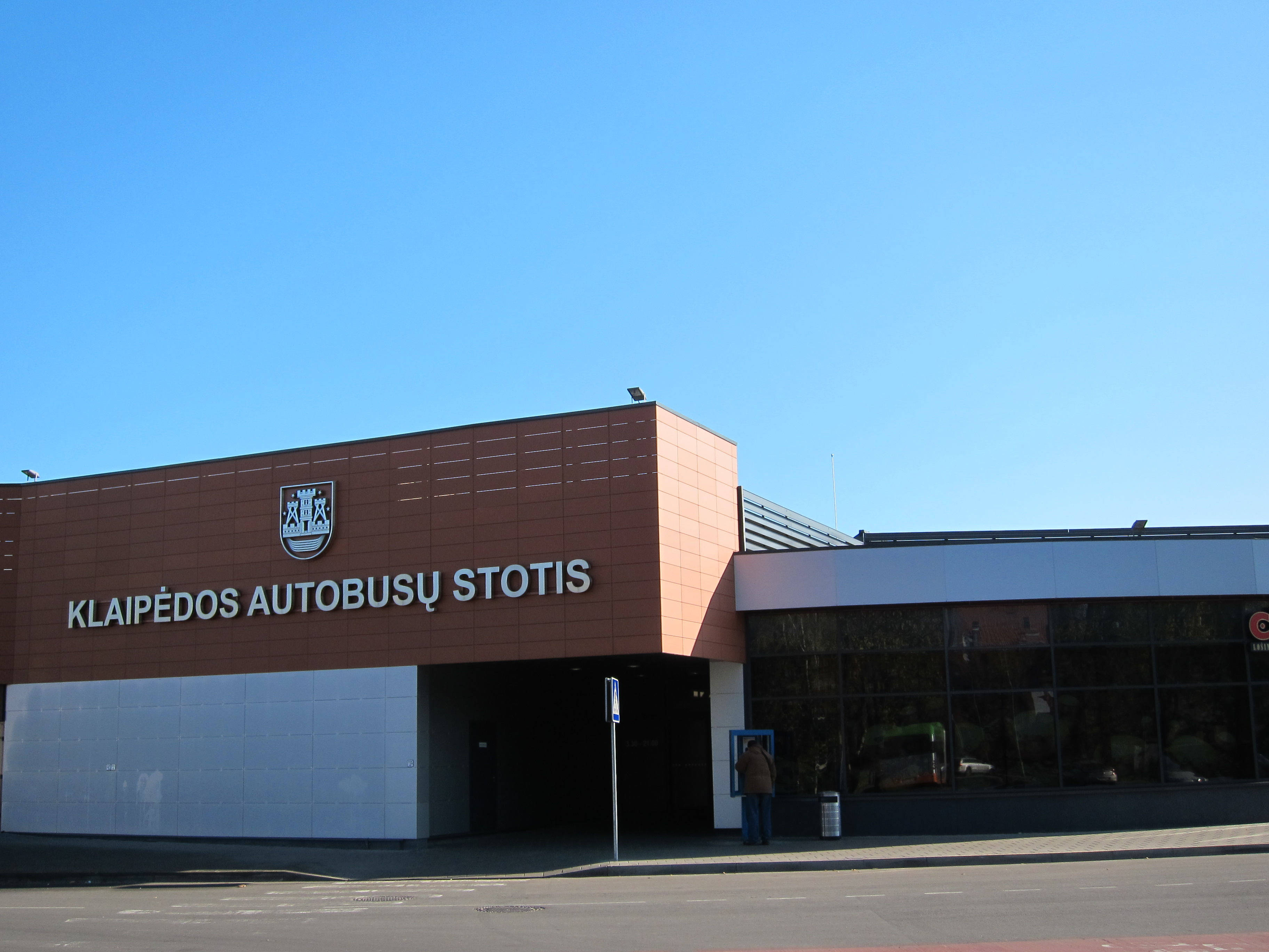 Klaipėdos autobusų stotis